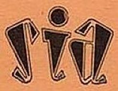 Solidarité Internationale Antifasciste (SIA) est fondée en Espagne, le 27 mai 1937, par la Confédération nationale du travail (CNT) avec les autres organisations libertaires, la Fédération anarchiste ibérique (FAI) et la Fédération ibérique des jeunesses libertaires (FIJL).